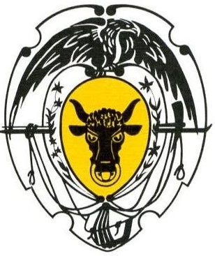 Bergführerabzeichen Kanton Uri 1888